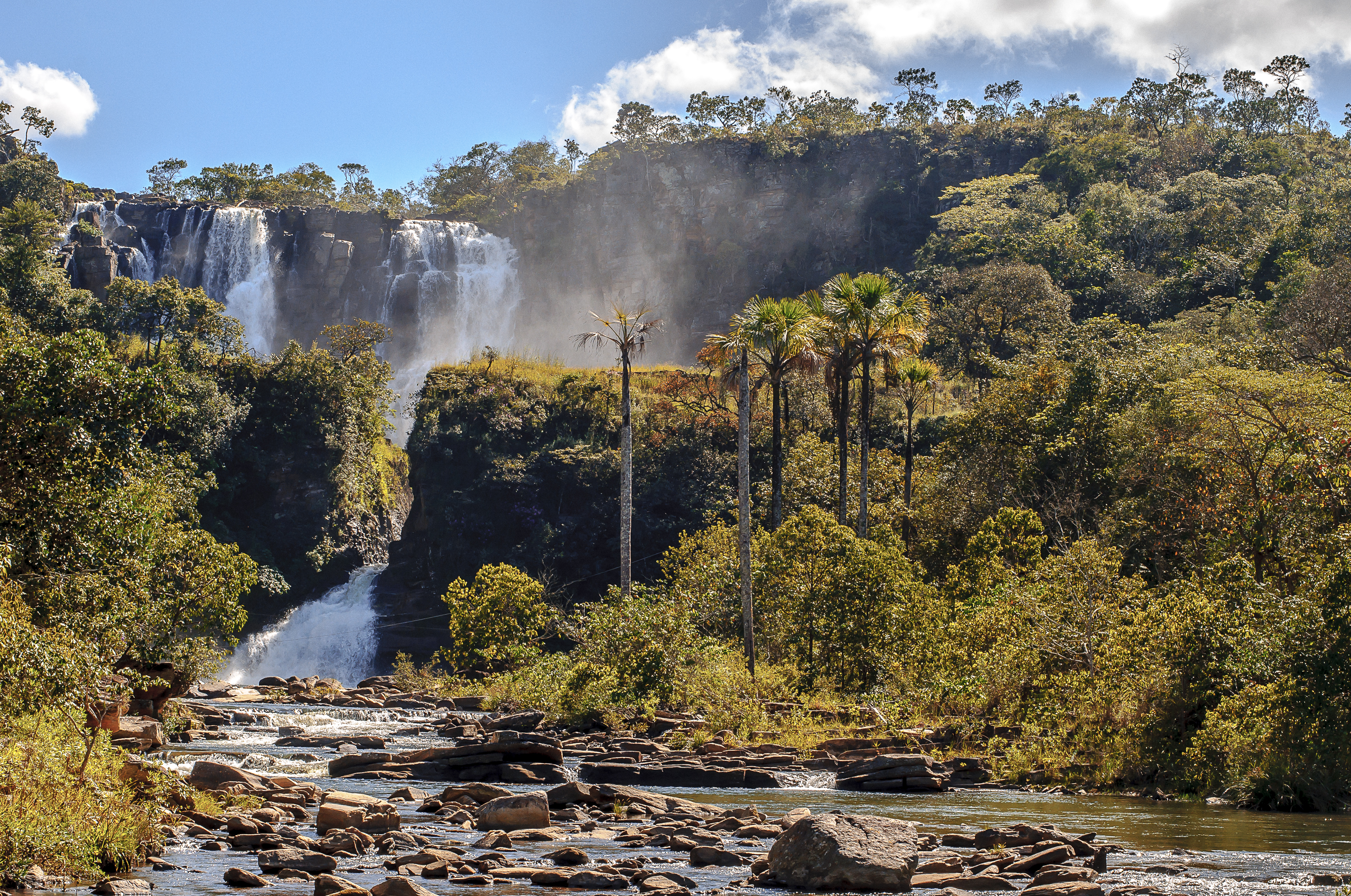 fcohen